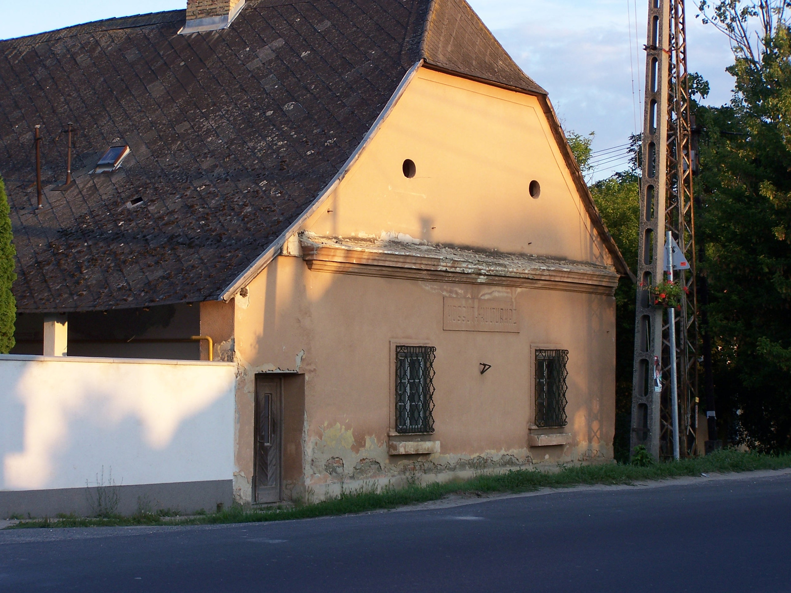 Tiszttartói ház (Kerepes, Szabadság út 252.) This is a photo of a monument in Hungary, Identifier: 12276